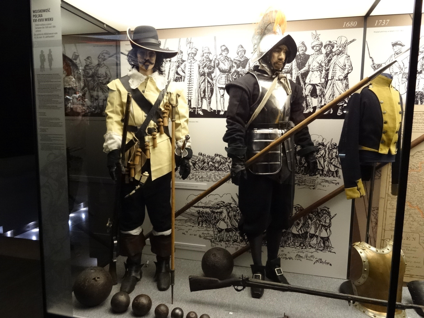 Muzeum Wojsk Lądowych w Bydgoszczy, ul. Czerkaska 2 podczas Nocy Muzeów 2015